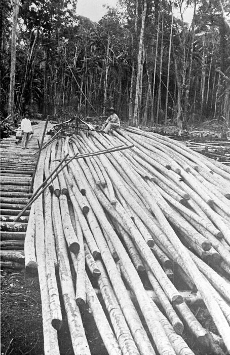 Repronegatief. Houtkapperij N BL 8 Niboeng, Mendol, Bengkalis, Sumatra's Oostkust 1930